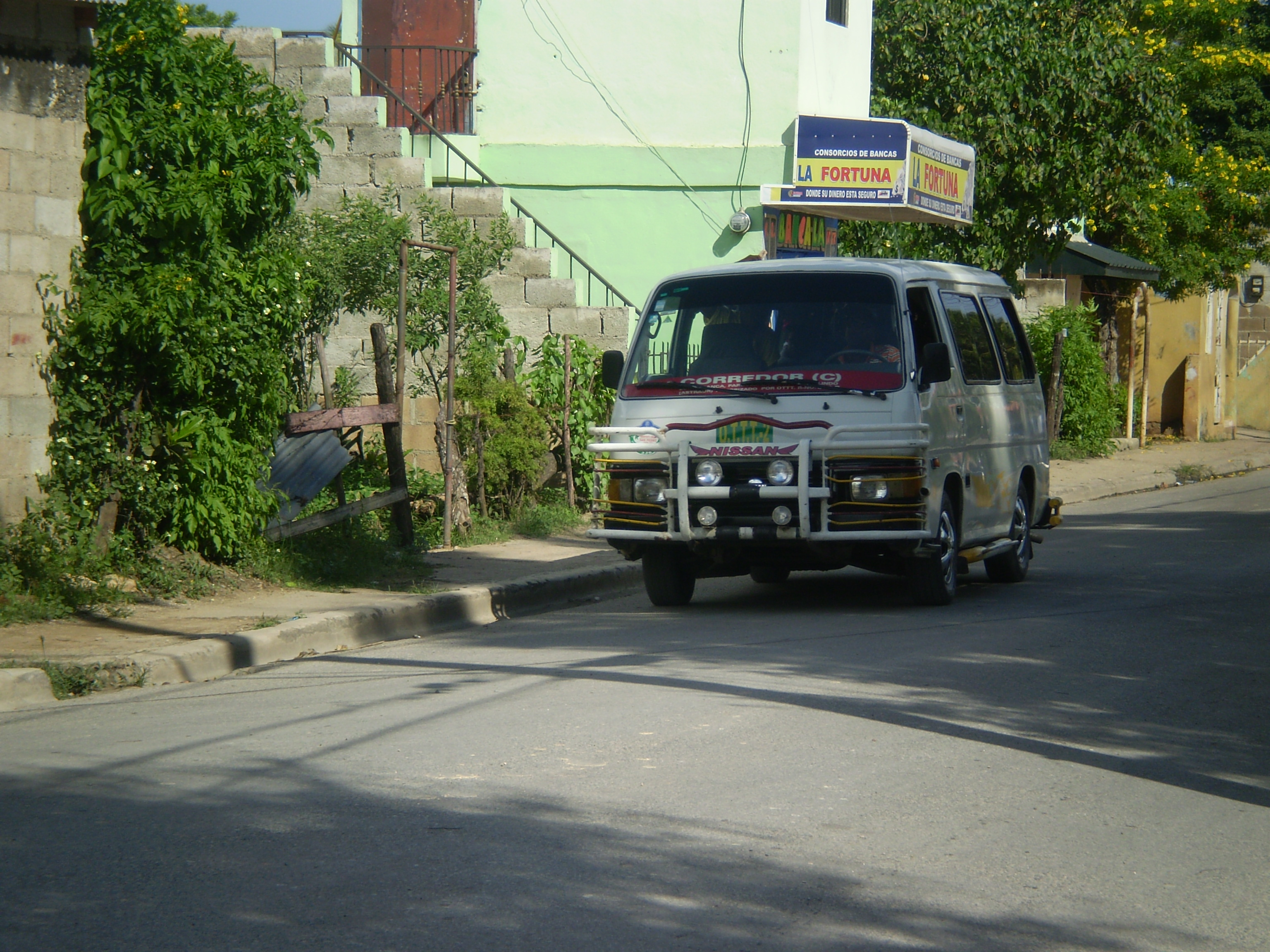 transporte publico villa progreso